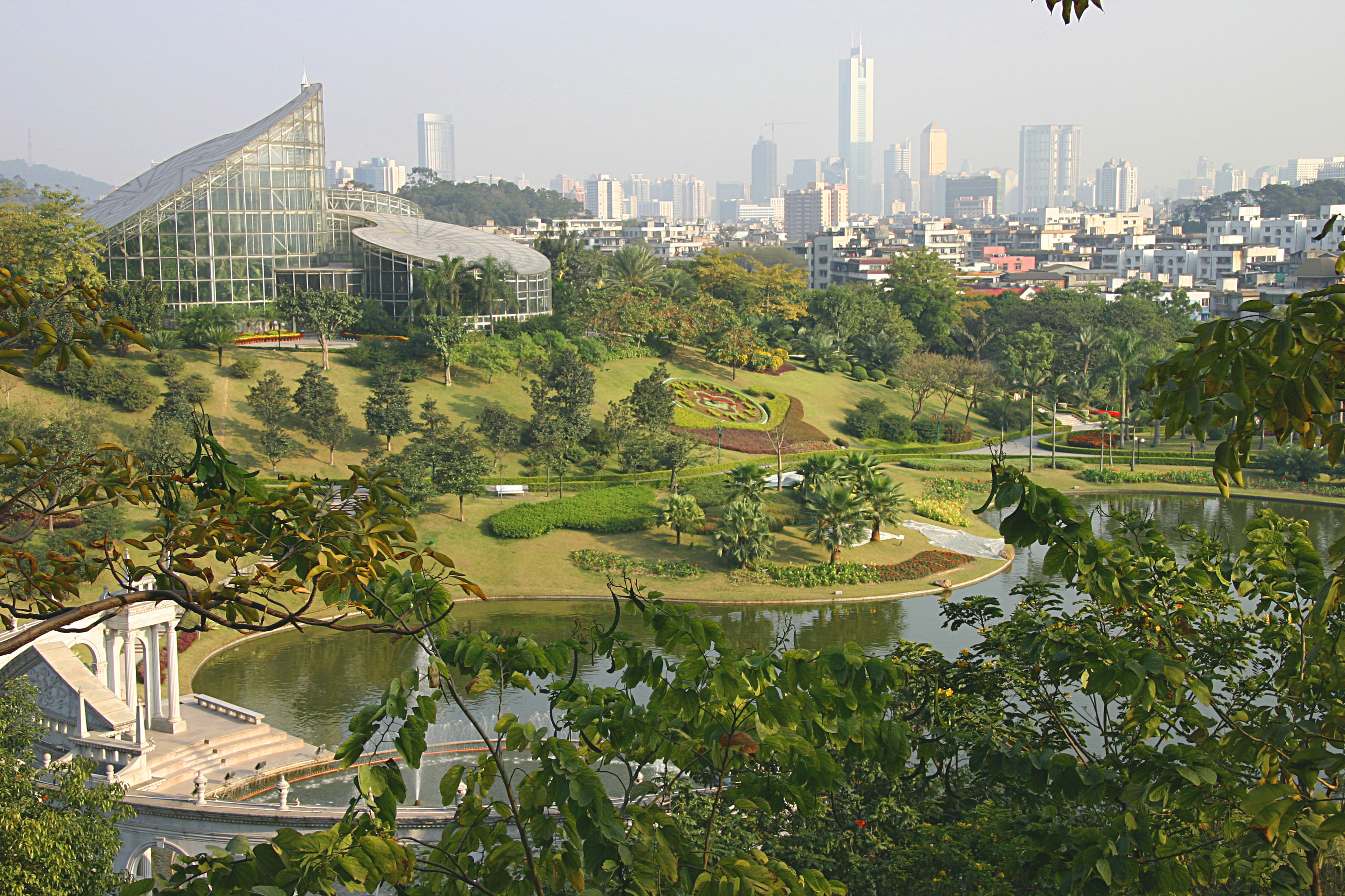 云台花园g